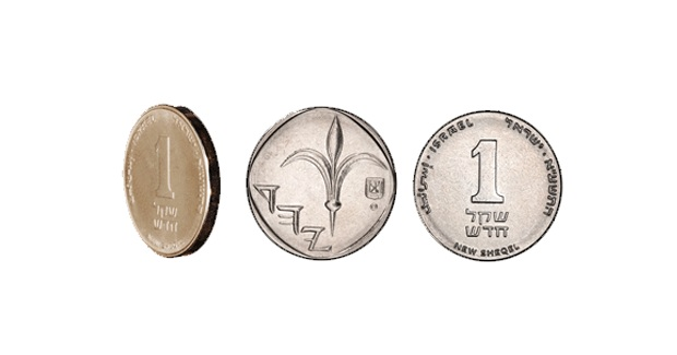 Израильский новый шекель 2010 года выпуска. Гурт, аверс и реверс.